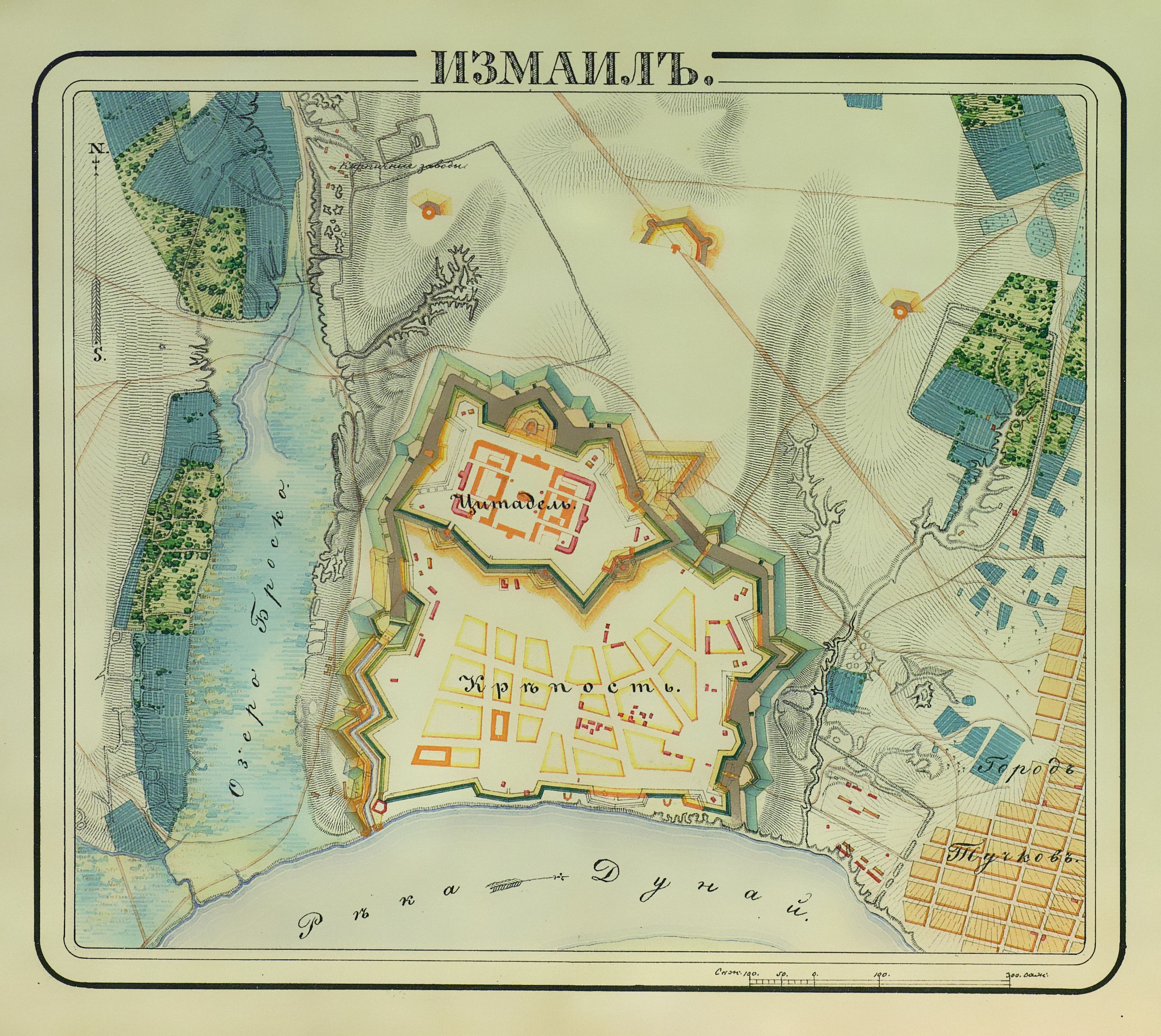 Izmail